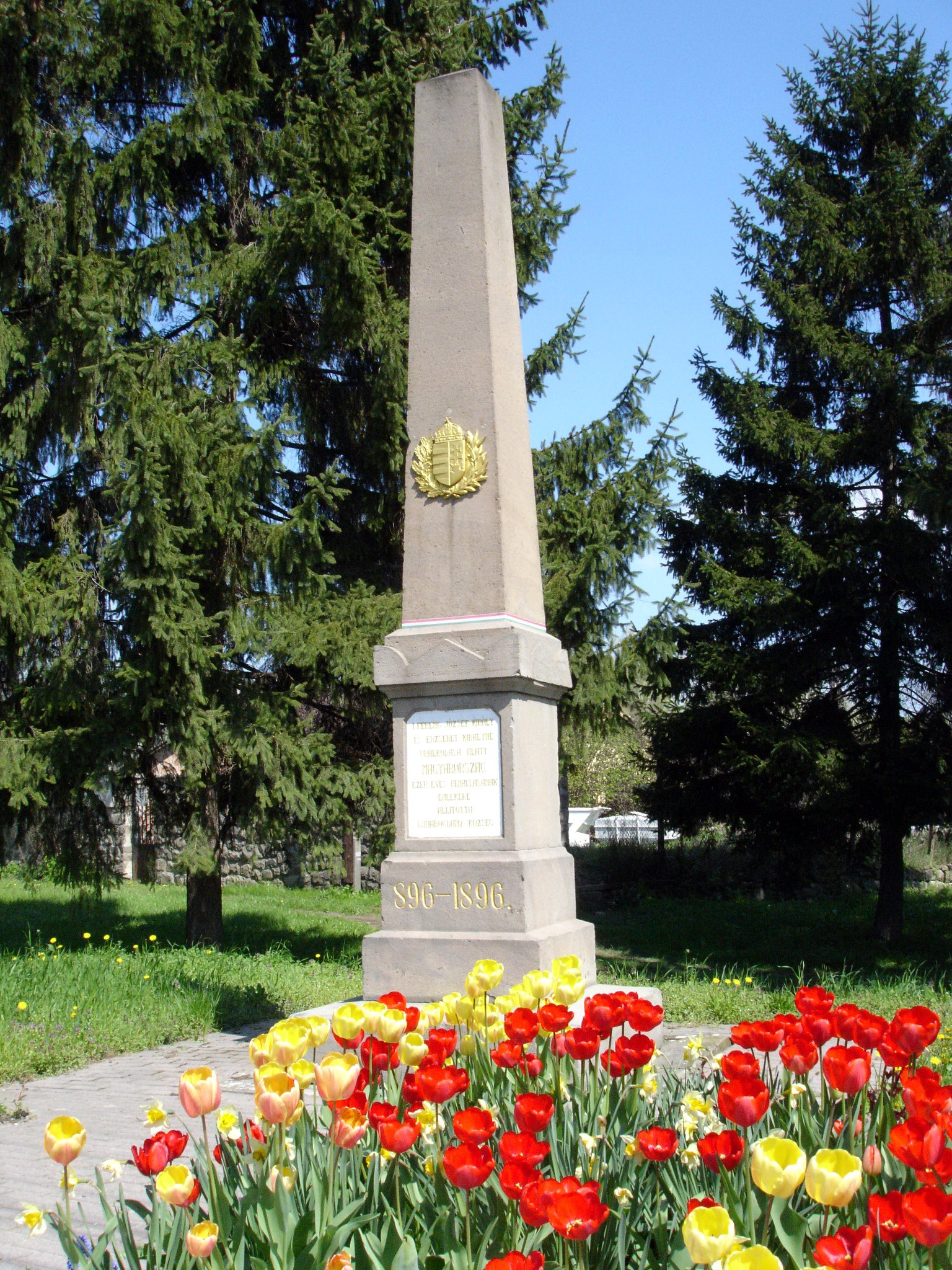 A Milleniumi emlékmű Dunabogdányban, Kossuth Lajos utca (Pest megye, Magyarország)